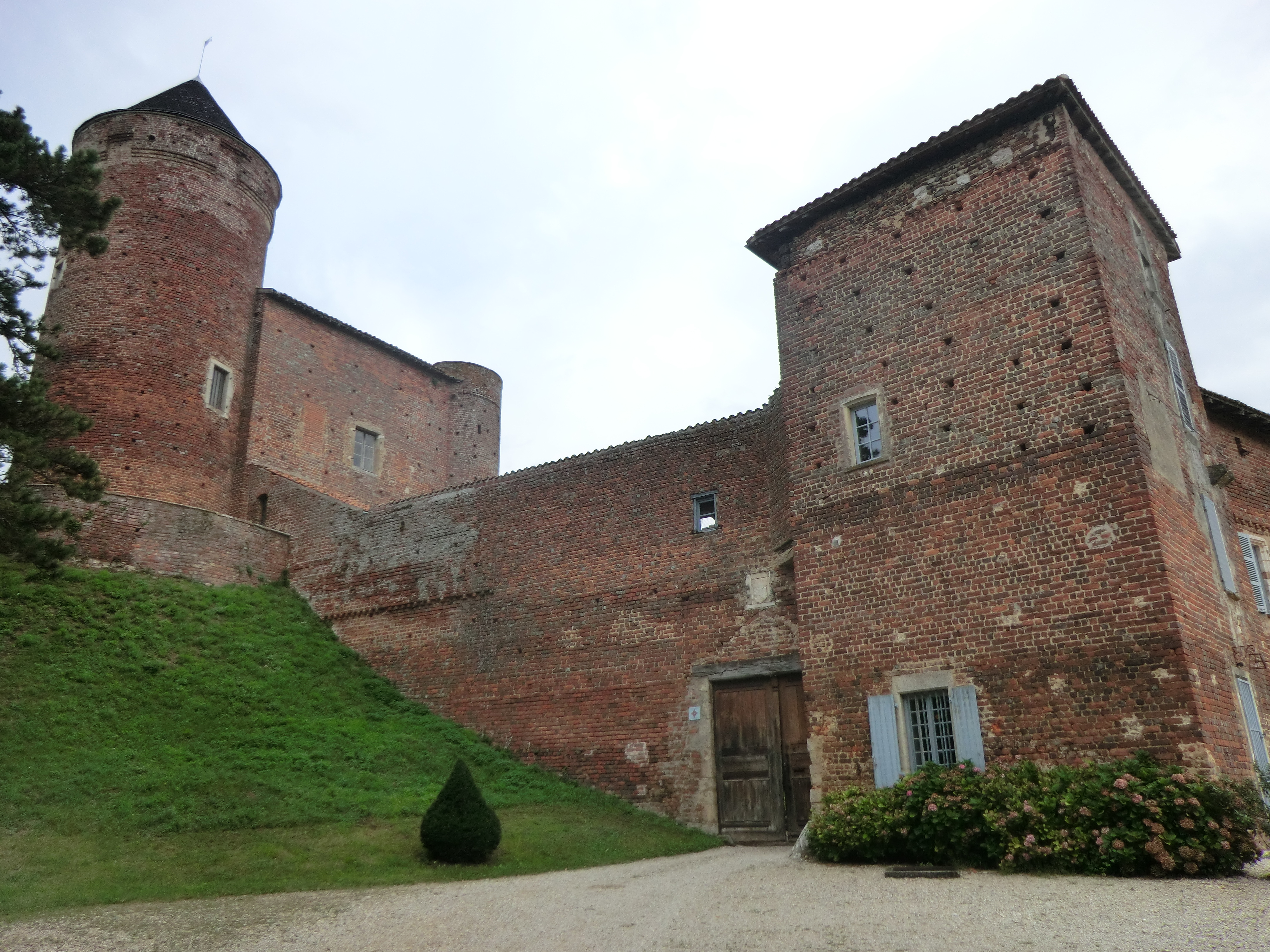 Ensemble castral du Montellier. .